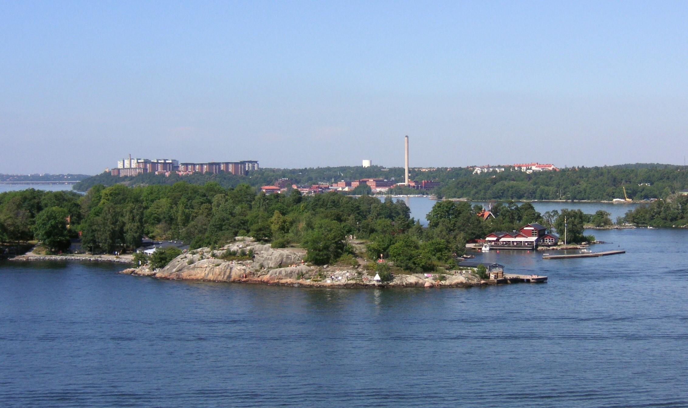 Fjäderholmarna, närmast i bild Stora Fjäderholmen, Stockholm.